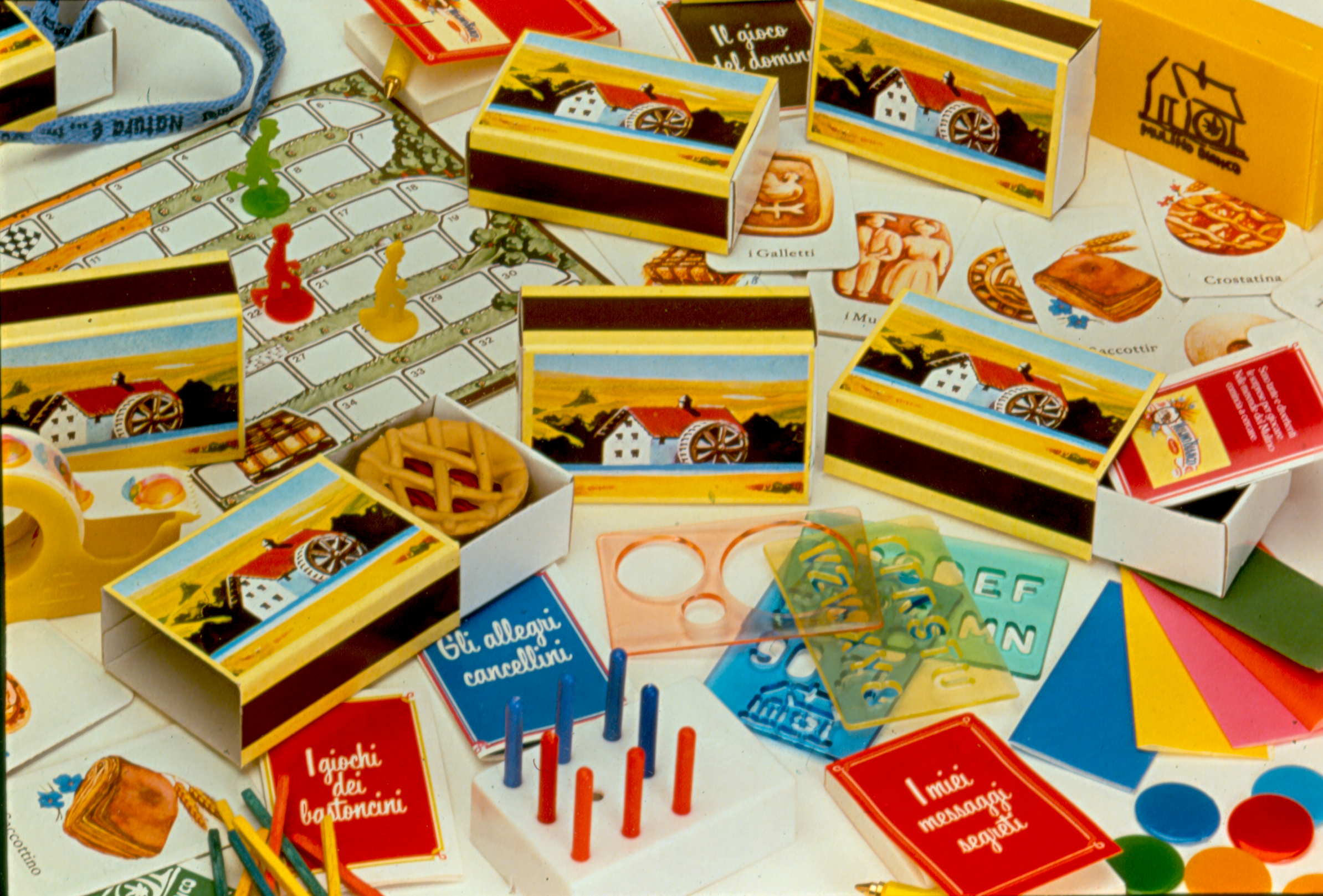 Serie di sorpresine in pack inserite nelle merende Mulino Bianco negli anni 1983-1990 (Archivio storico Barilla G. e R. Fratelli spa, Fondo Barilla)